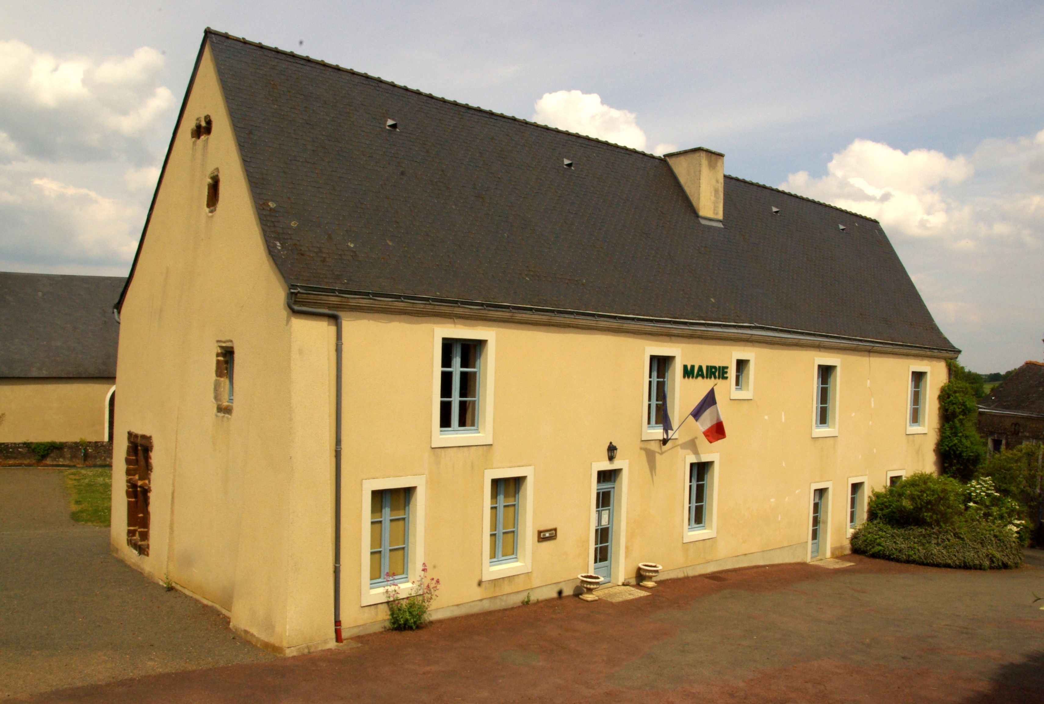 Mairie de Poillé-sur-Vègre